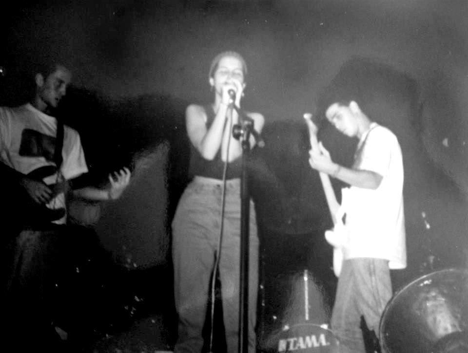 Integrantes de los Arboles en vivo